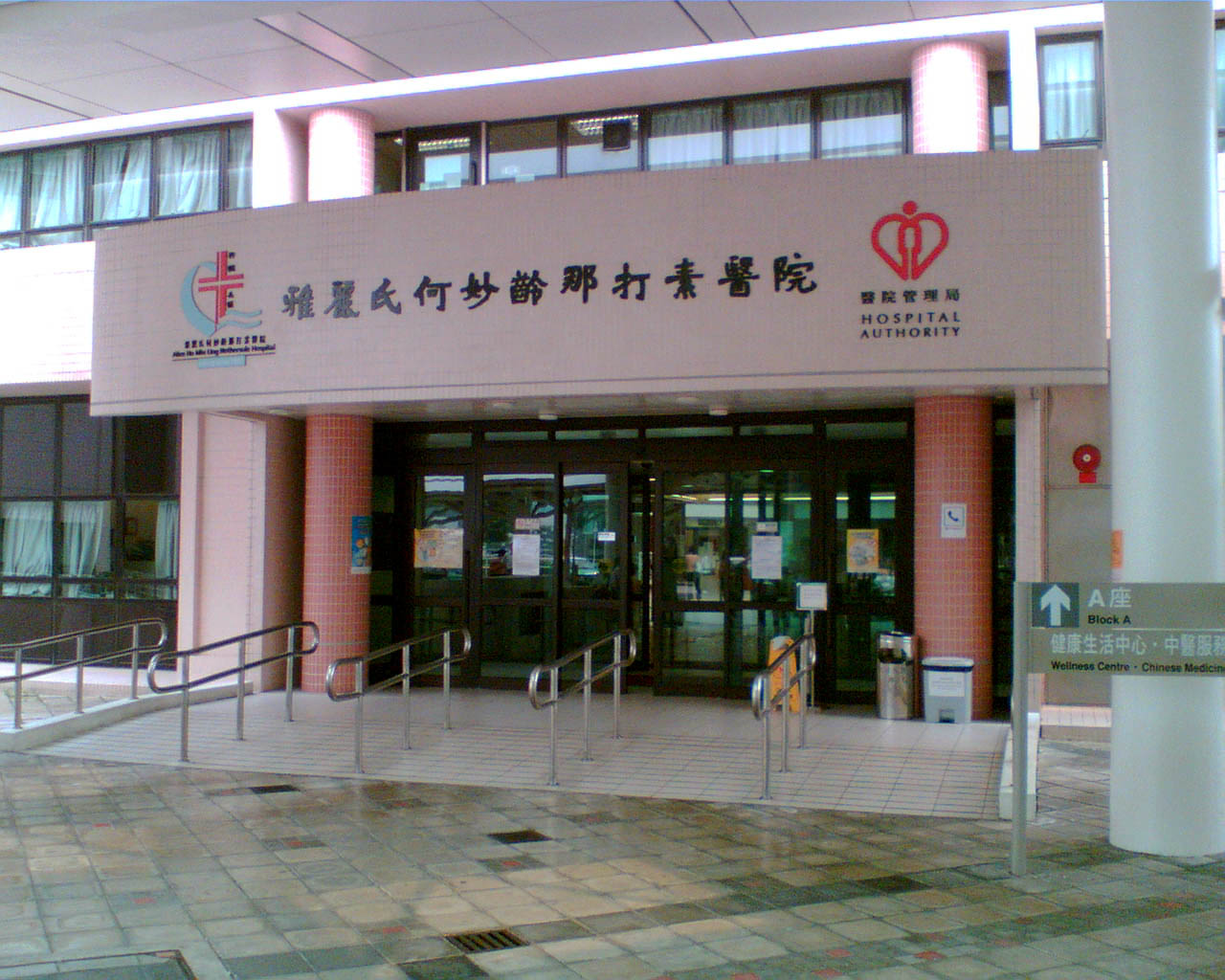 那打素院徽（左）